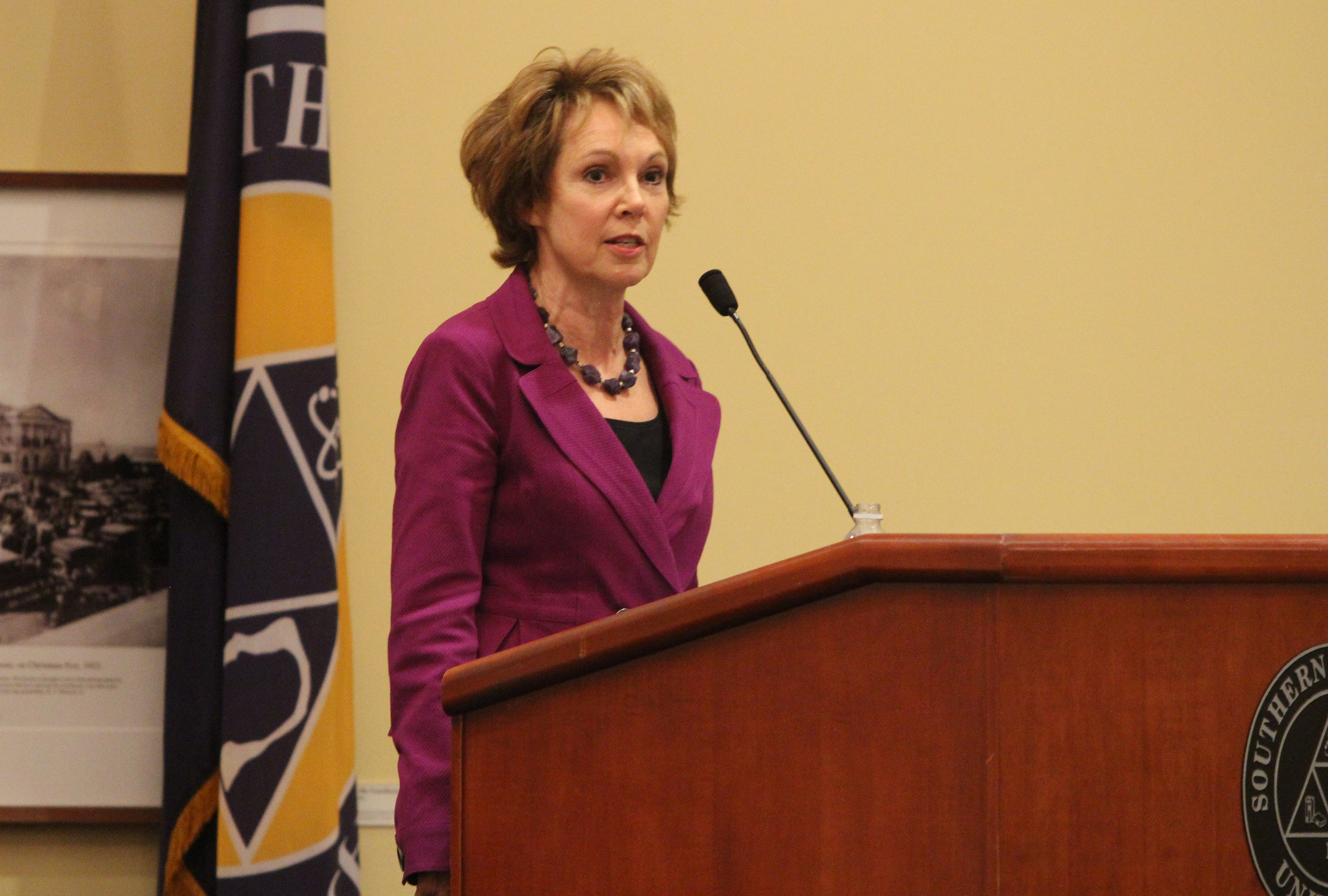 FB&T Eisenhower, David and Julie 9.13.12